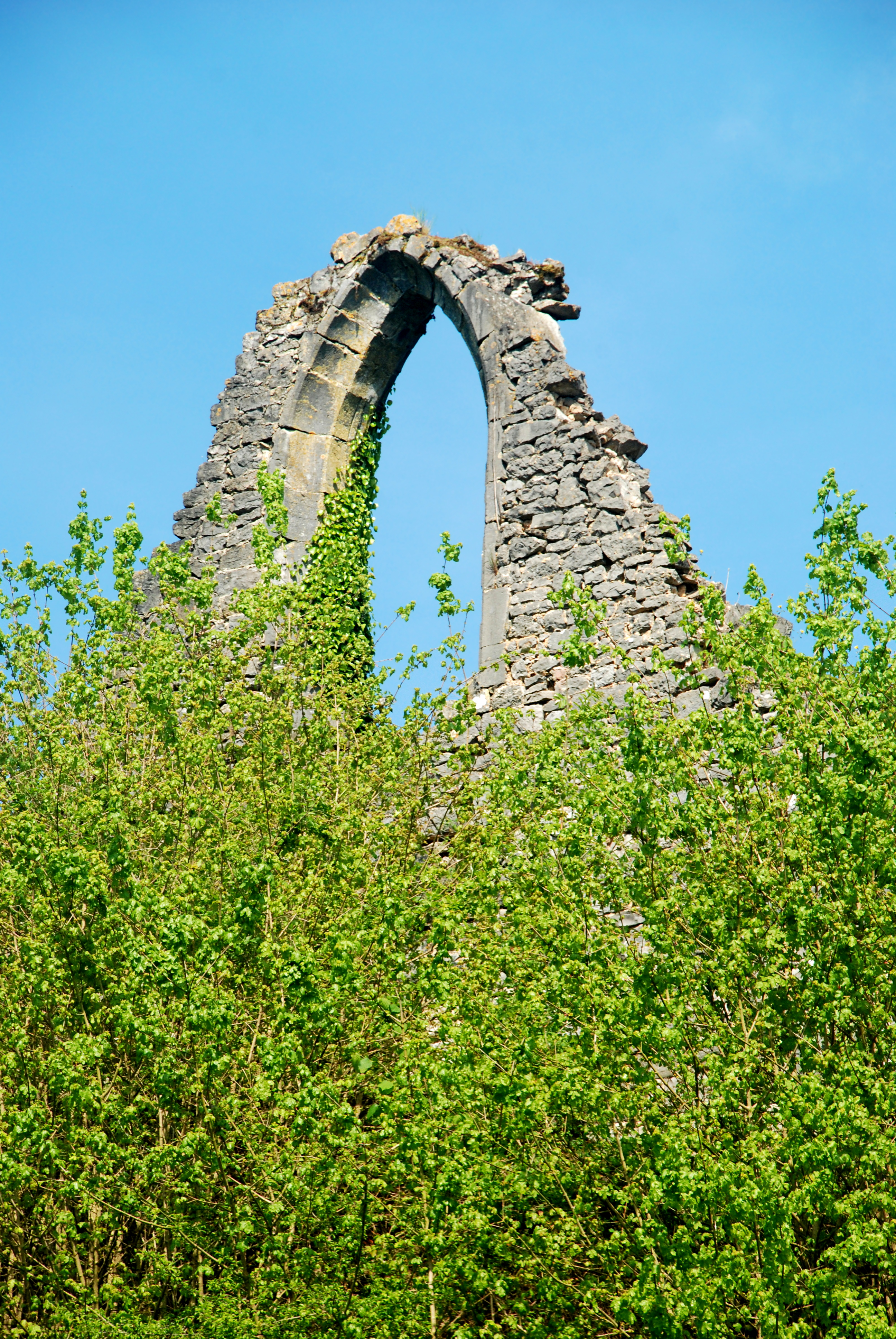 Belgique - Province de Namur - Viroinval - Nismes - Ancienne église Saint-Lambert (1606)